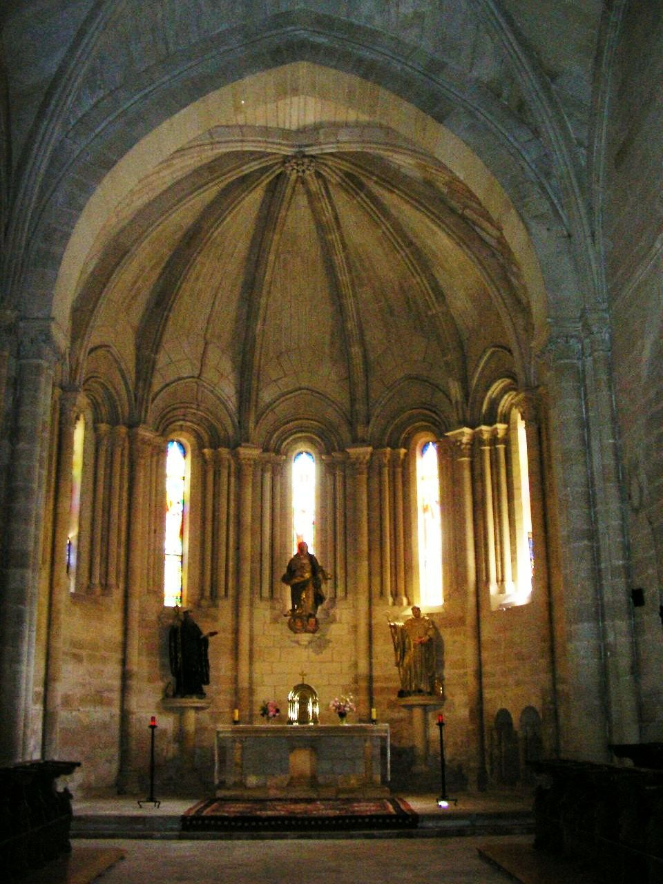 Cabecera de la iglesia del Monasterio de San Andrés del Arroyo, Santibáñez de Ecla (Palencia)